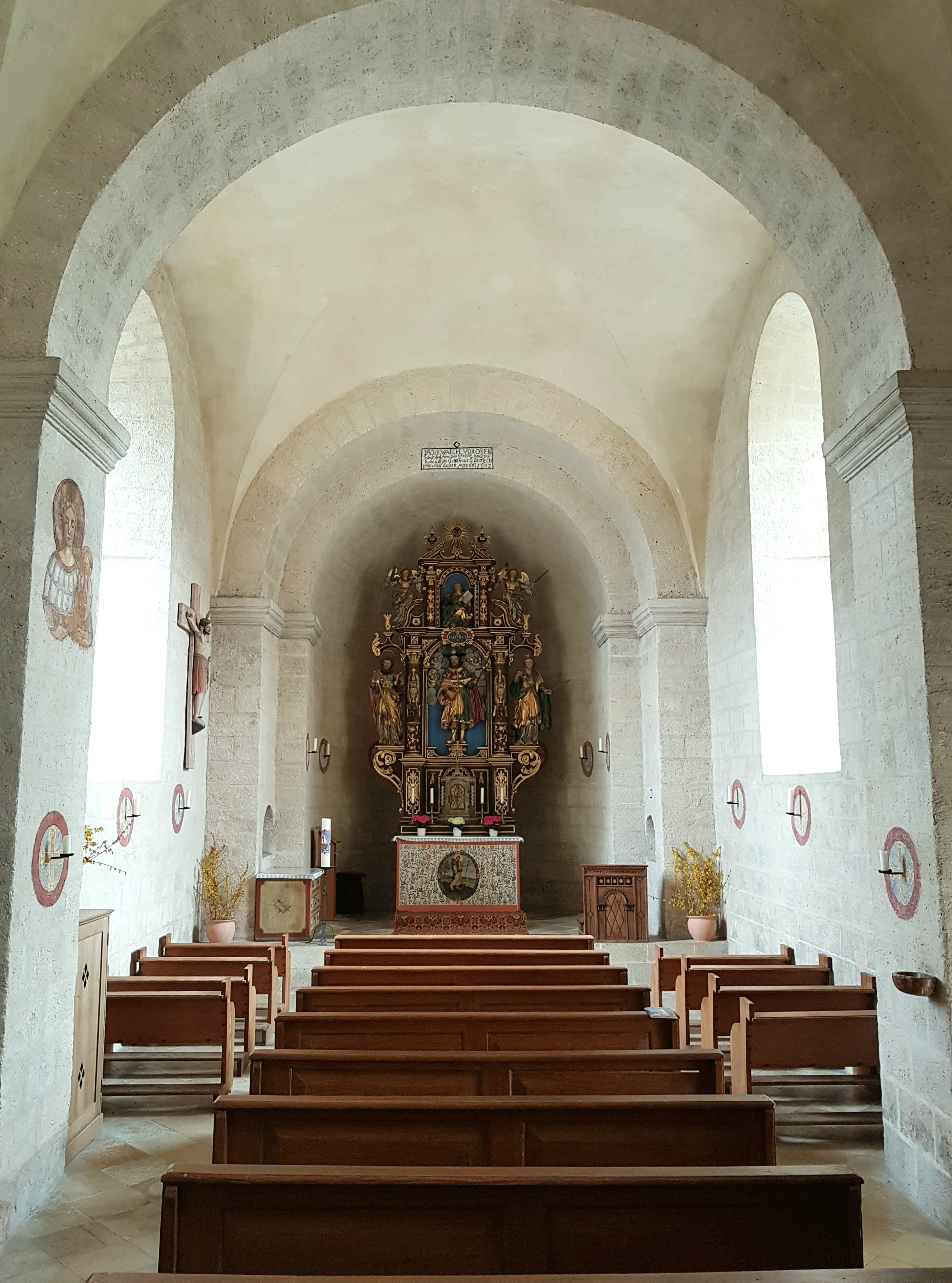 Sankt Jakobus (Schondorf am Ammersee)